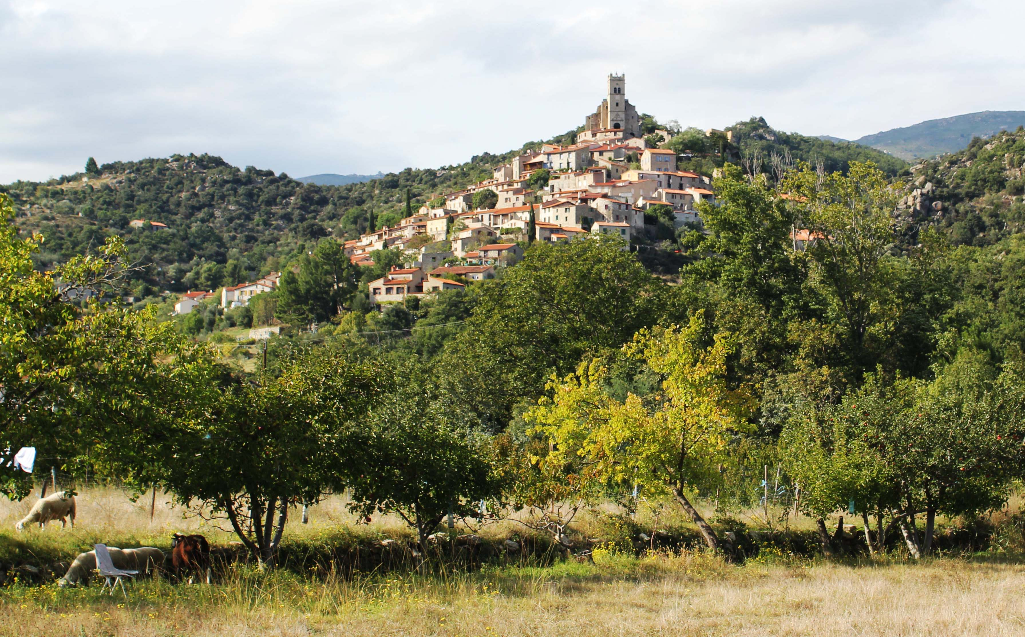 Village perché d'Eus, parmi les plus beaux villages de France